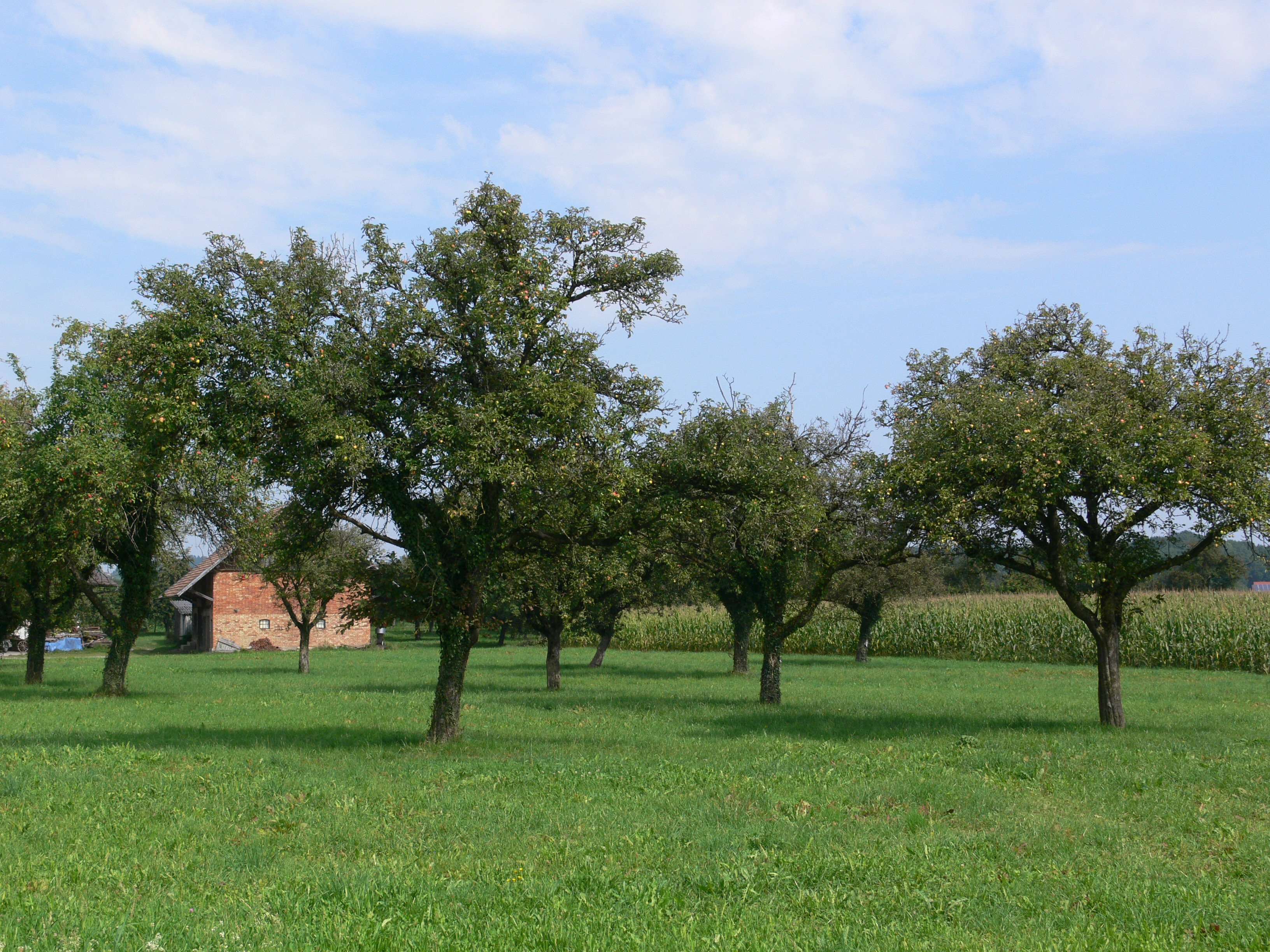 Eggartskirch, Ortschaft Taldorf, Stadt Ravensburg; Blick von der Pfarrkirche St. Isidor in die umgebende Landschaft